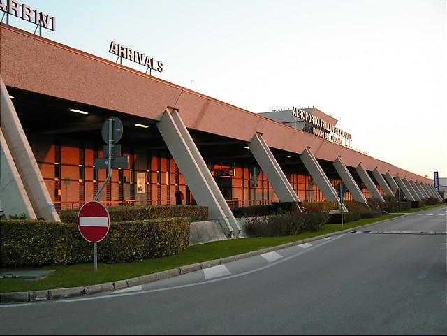 Ronchi terminal